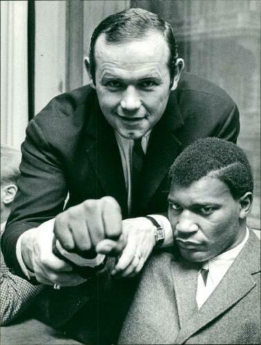 Buster Mathis in Sweden